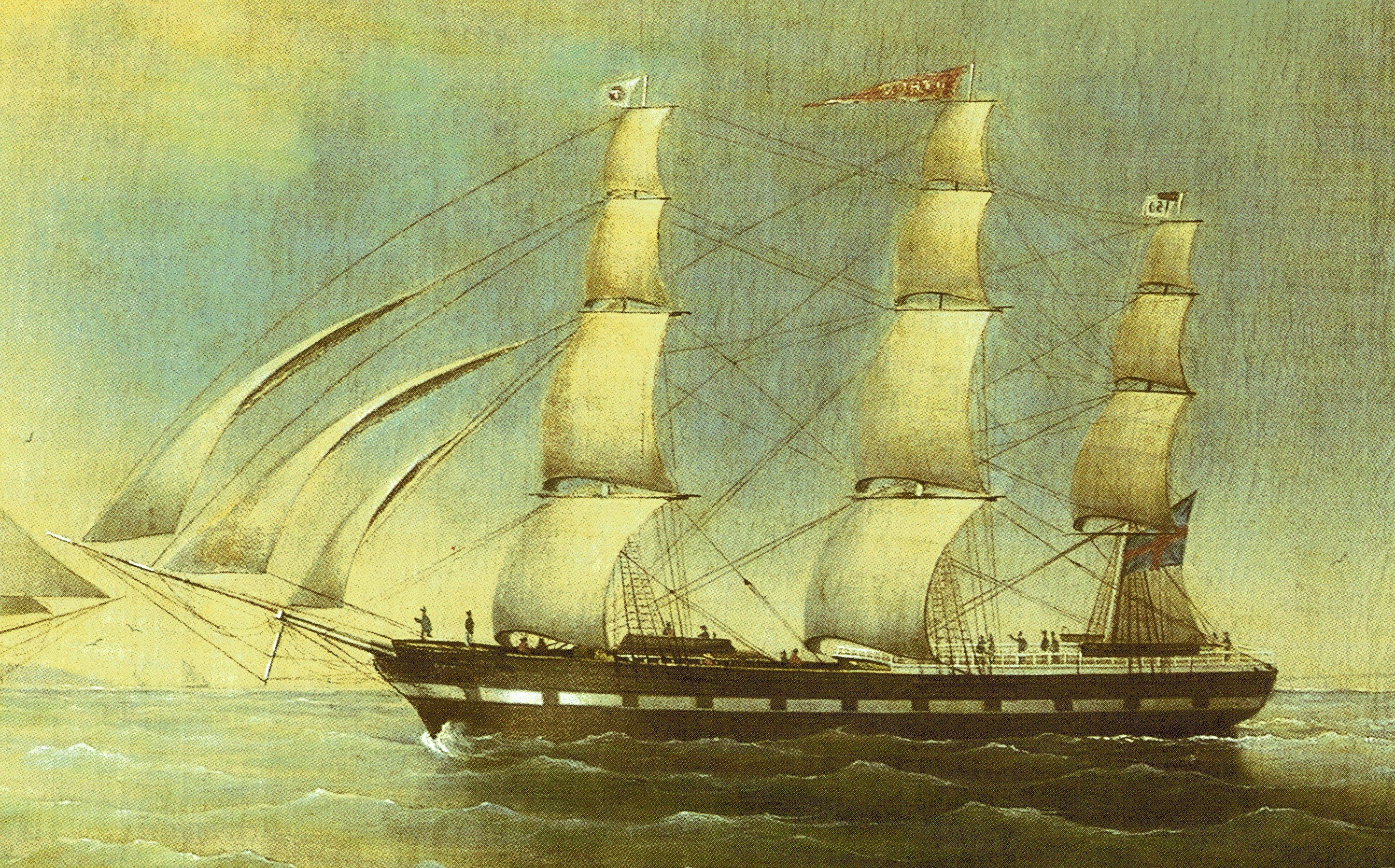 Bark O. THYEN der Oldenburgischen Rhederei-Gesellschaft um 1856. Ausschnitt aus einem Gemälde von Carl Justus Harmen Fedeler